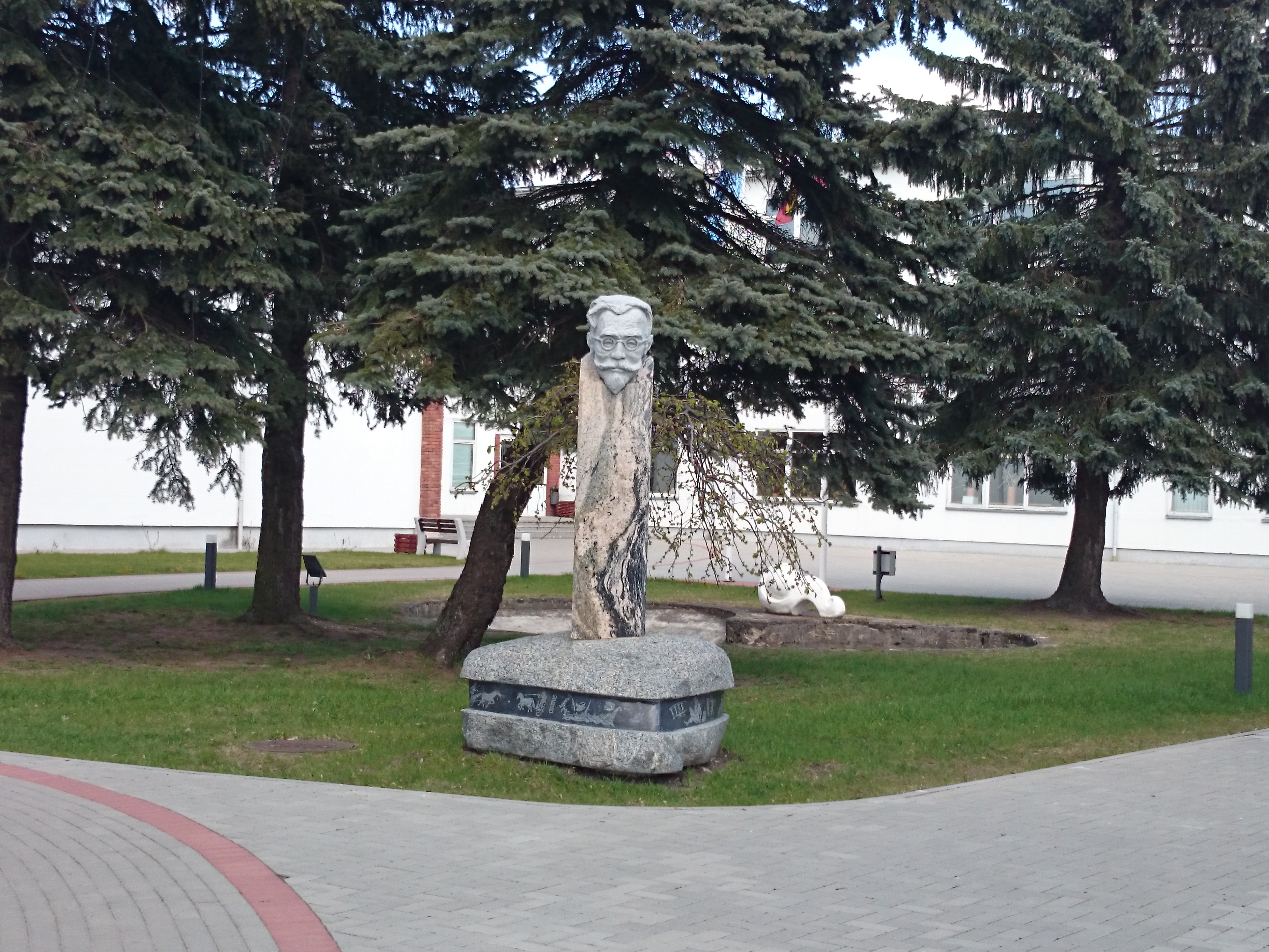 JRalio gimnazija kiemas